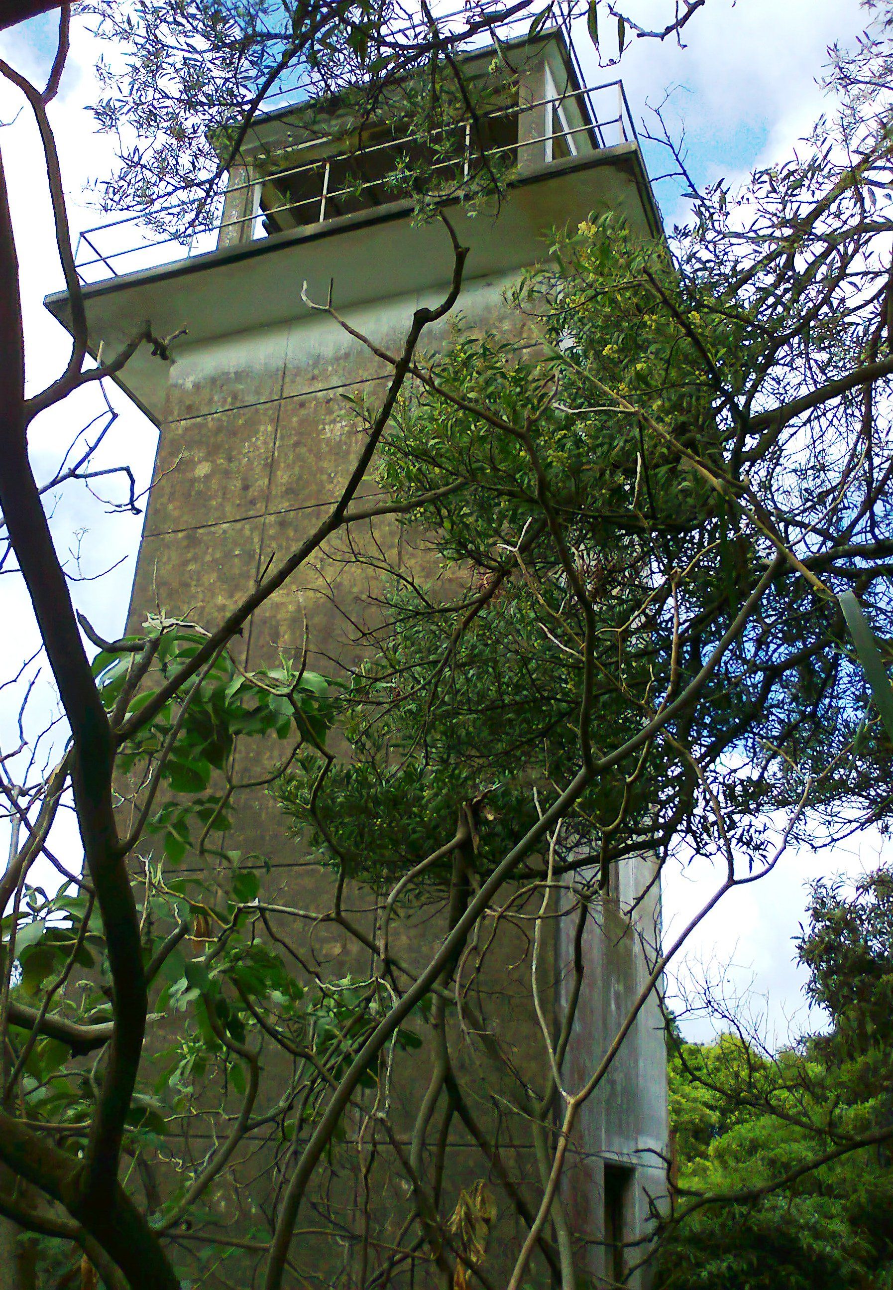 Aeroporto de Santana, lugar de Santana, freguesia de Rabo de Peixe, concelho da Ribeira Grande, ilha de São Miguel, Açores: antiga torre de controlo.